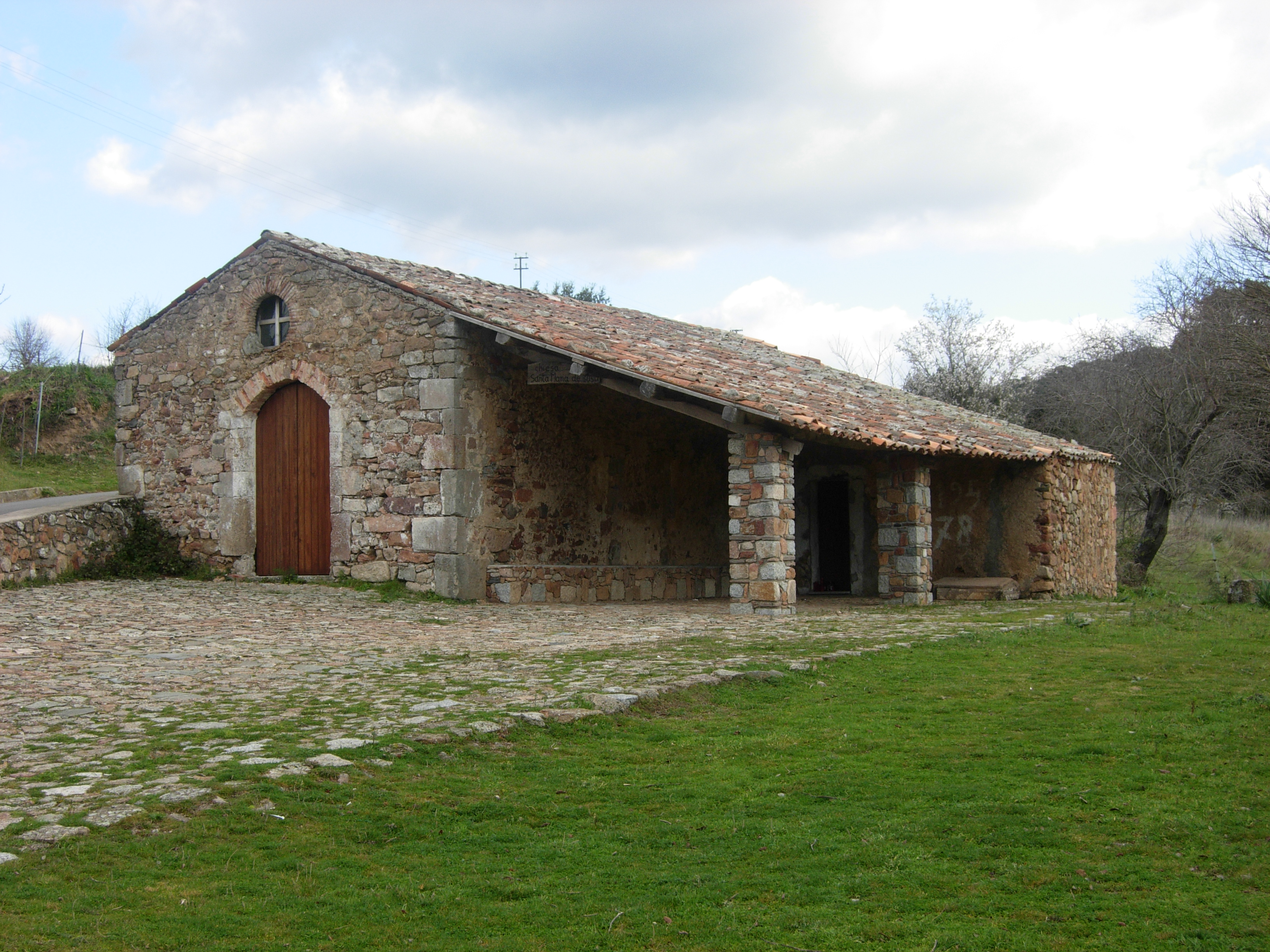 Chiesa campestre di Santa Maria de Susu ad Atzara(NU)